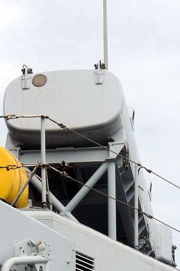 Il lanciamissili del Teseo della fregata Scirocco